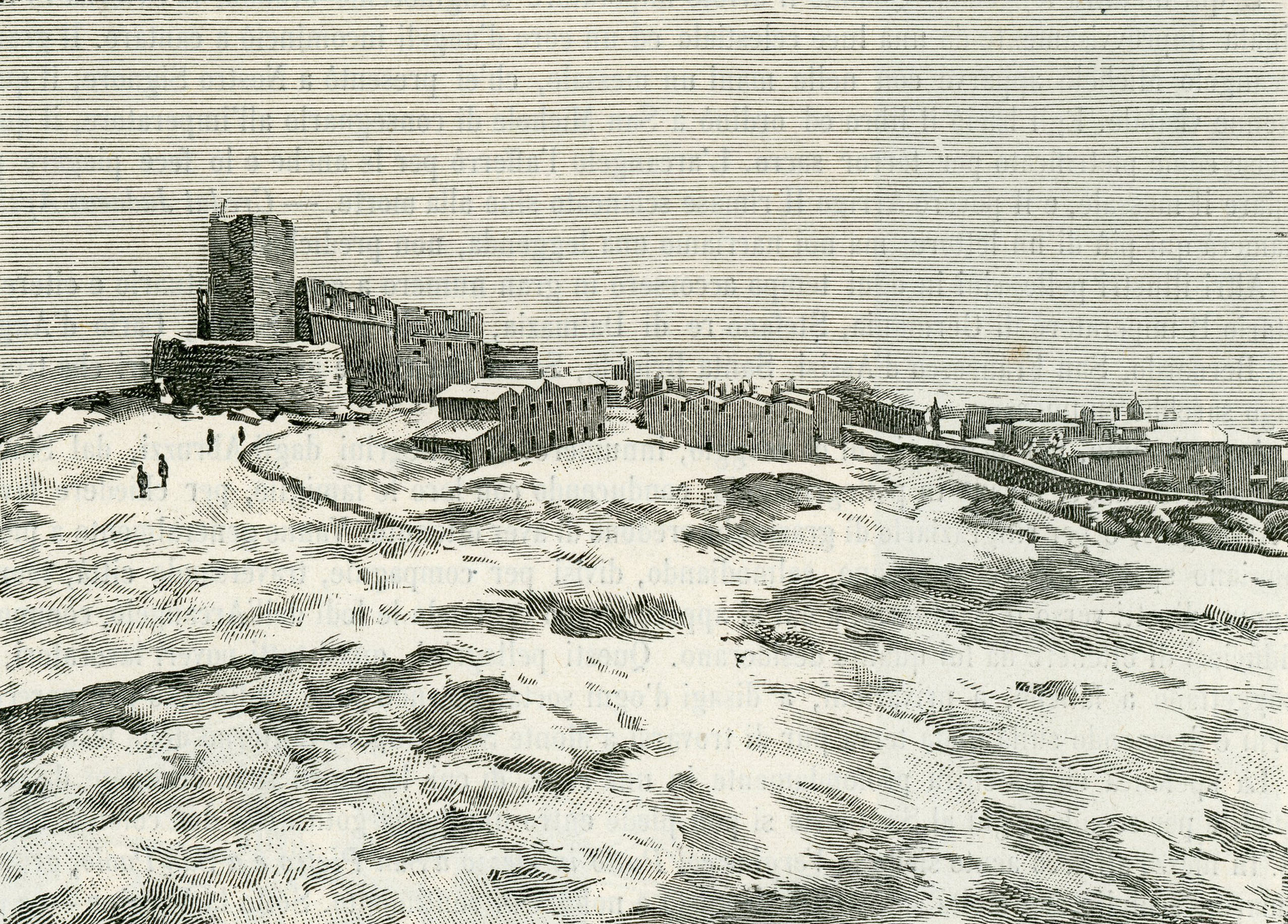 Monte Sant’Angelo: castello detto Gigante, (xilografia).